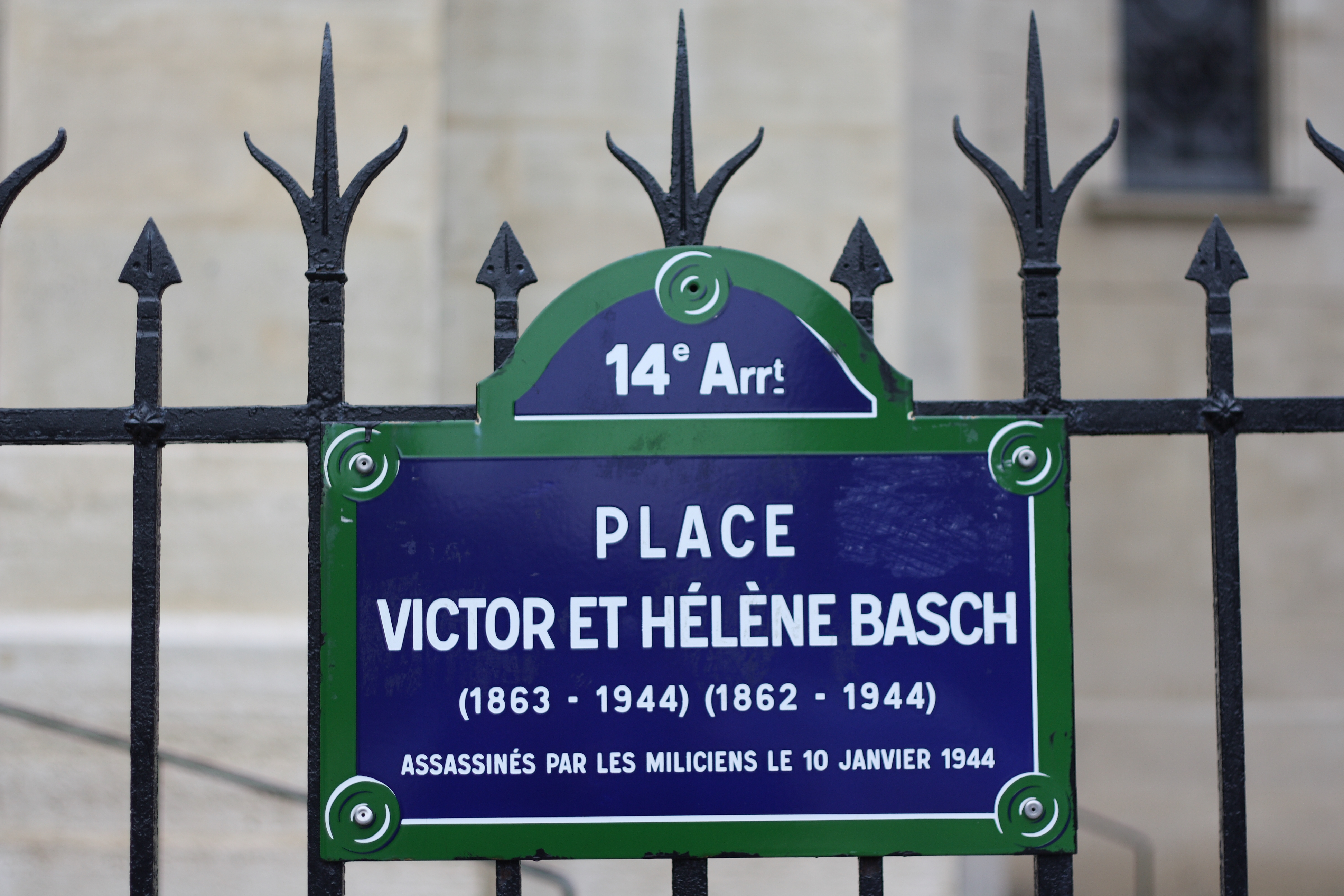 Platz vor der Kirche Saint-Pierre-de-Montrouge in Paris (14. Arrondissement), Straßenschild: Platz Victor et Hélène Basch